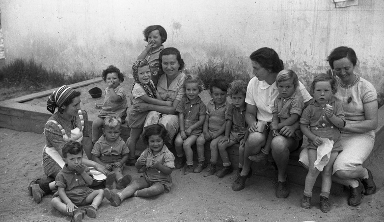 פעוטים. נען 1935-40 - פק-נען, 4